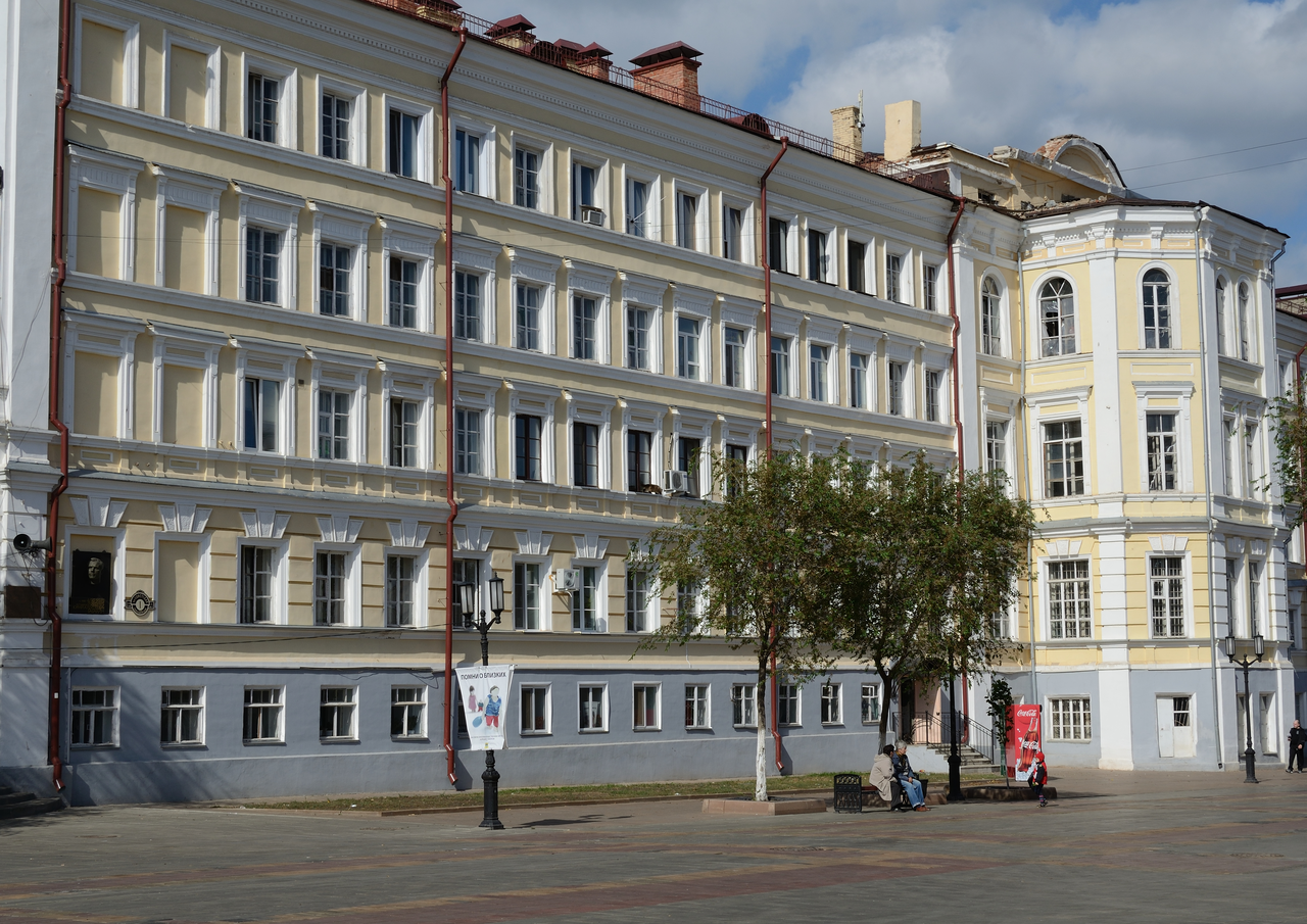 здание Оренбургского высшего авиационного училища, в котором в 1955-1957 гг. учился первый в мире летчик-космонавт Гагарин Юрий Алексеевич (прогимназия военная; "Кадетский корпус")